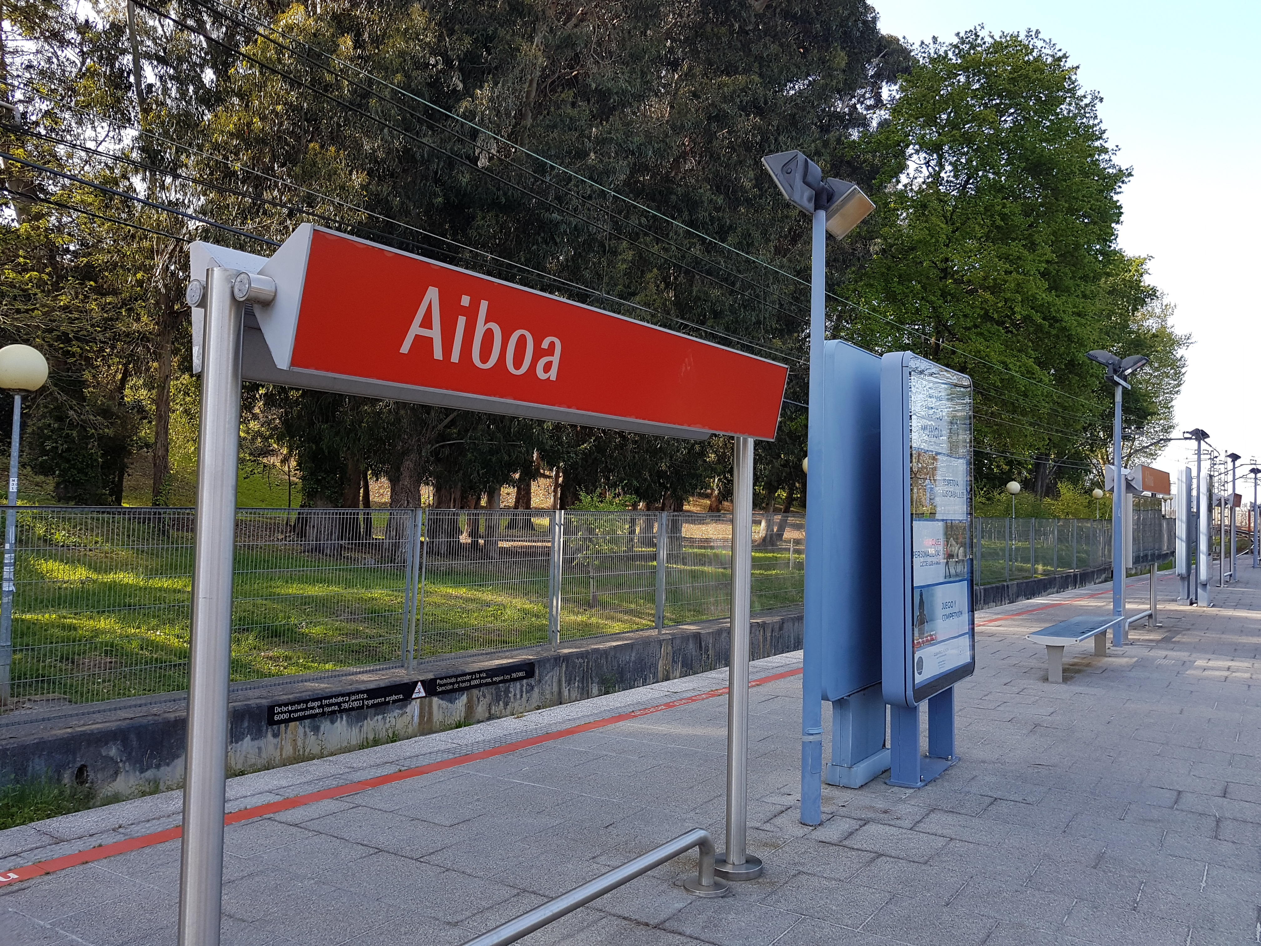 Estación de Aiboa.